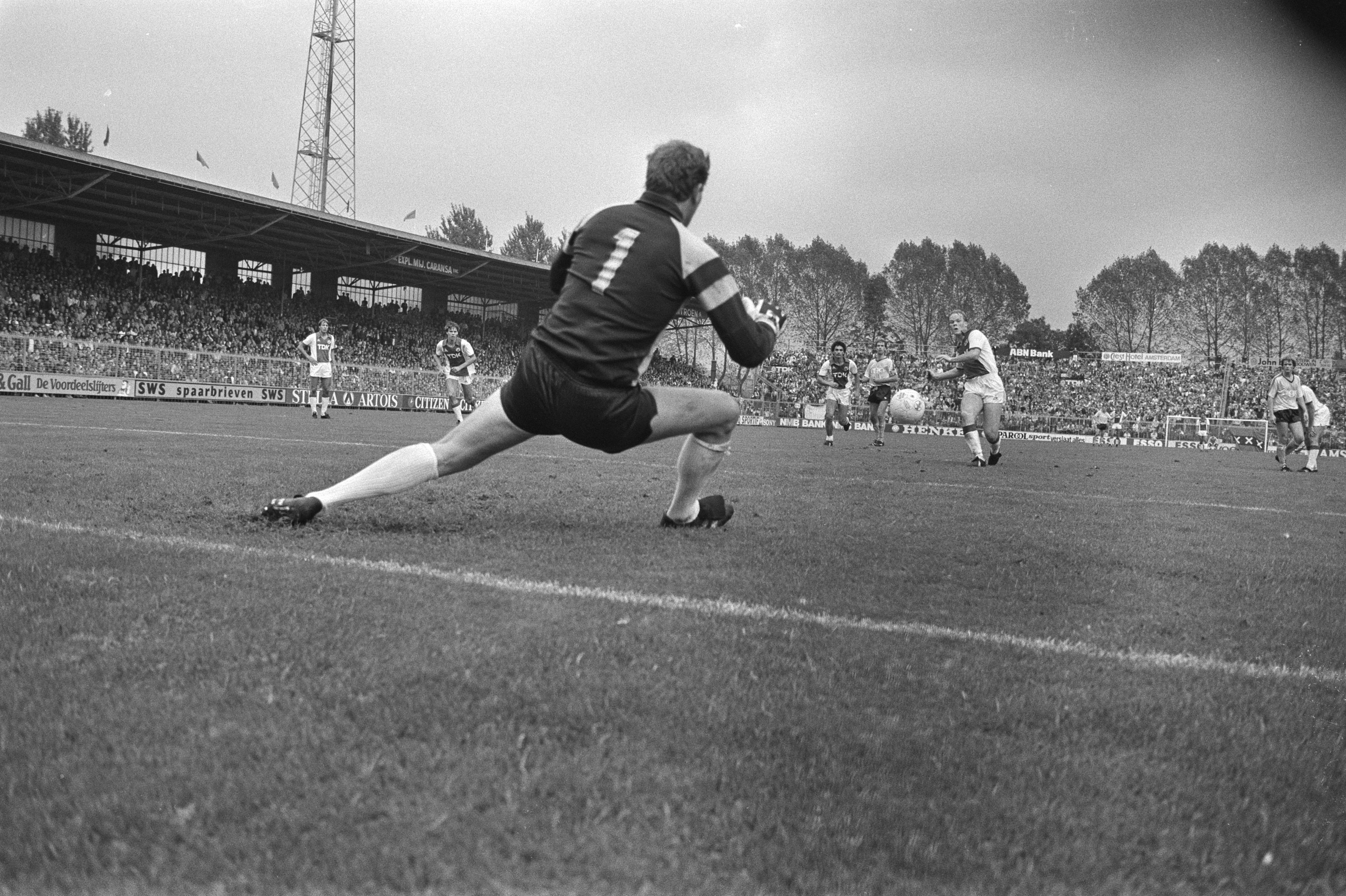 Collectie / Archief : Fotocollectie Anefo Reportage / Serie : Ajax tegen FC Groningen 1-1 Beschrijving : Koeman (Ajax) mist een penalty Datum : 2 oktober 1983 Locatie : Amsterdam, Noord-Holland Trefwoorden : voetbal, voetballers, wedstrijden Persoonsnaam : Koeman, [...] Instellingsnaam : AJAX Fotograaf : Antonisse, Marcel / Anefo Auteursrechthebbende : Nationaal Archief Materiaalsoort : Negatief (zwart/wit) Nummer archiefinventaris : bekijk toegang 2.24.01.05 Bestanddeelnummer : 932-7188